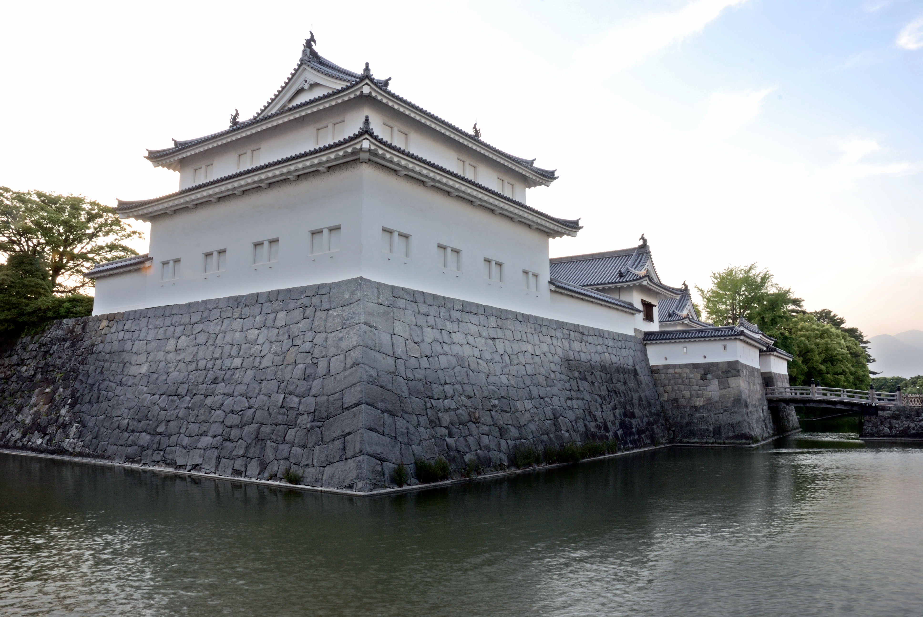 Tatsumiyagura